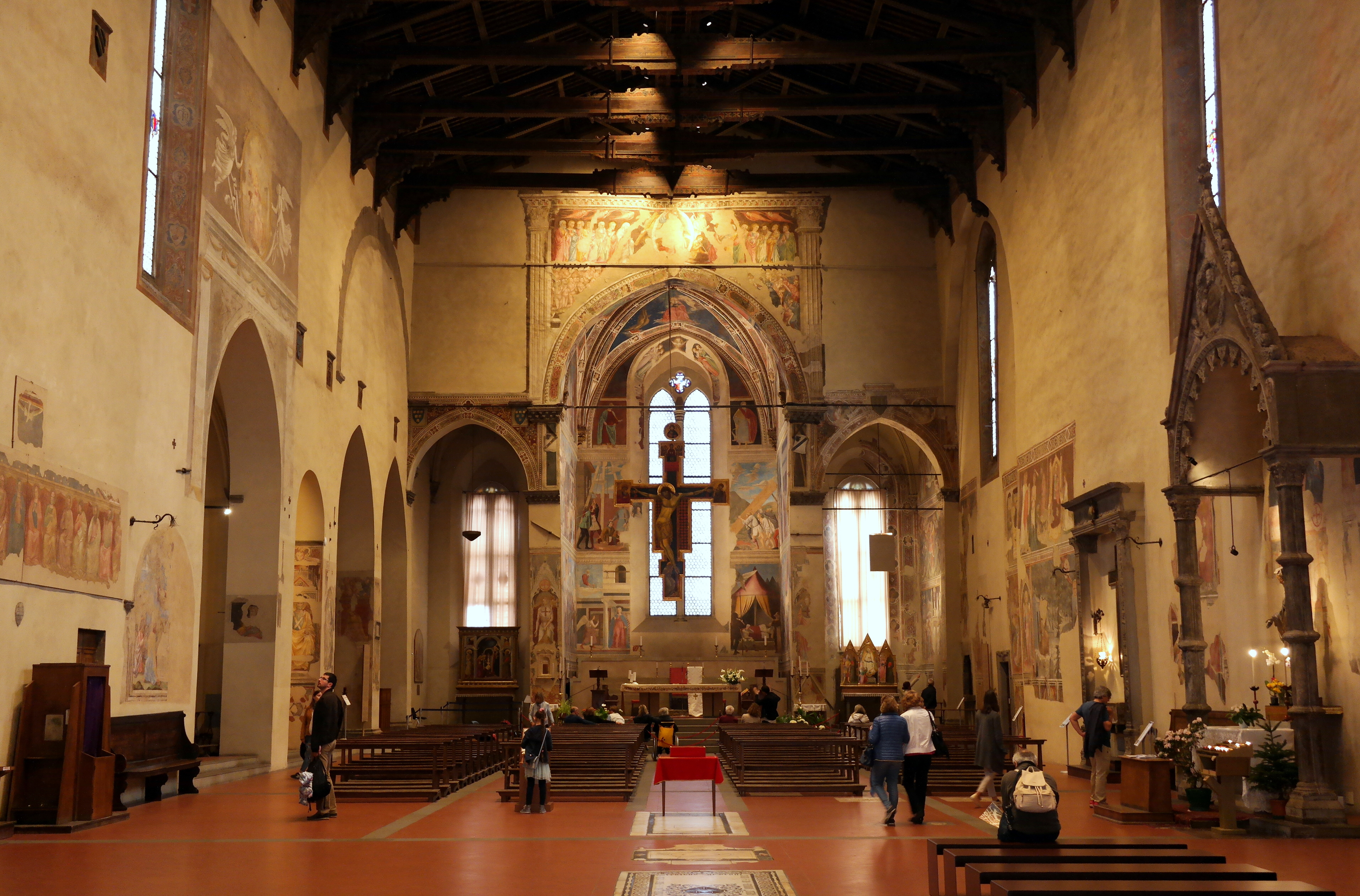 Intero della Chiesa di San Francesco ad Arezzo